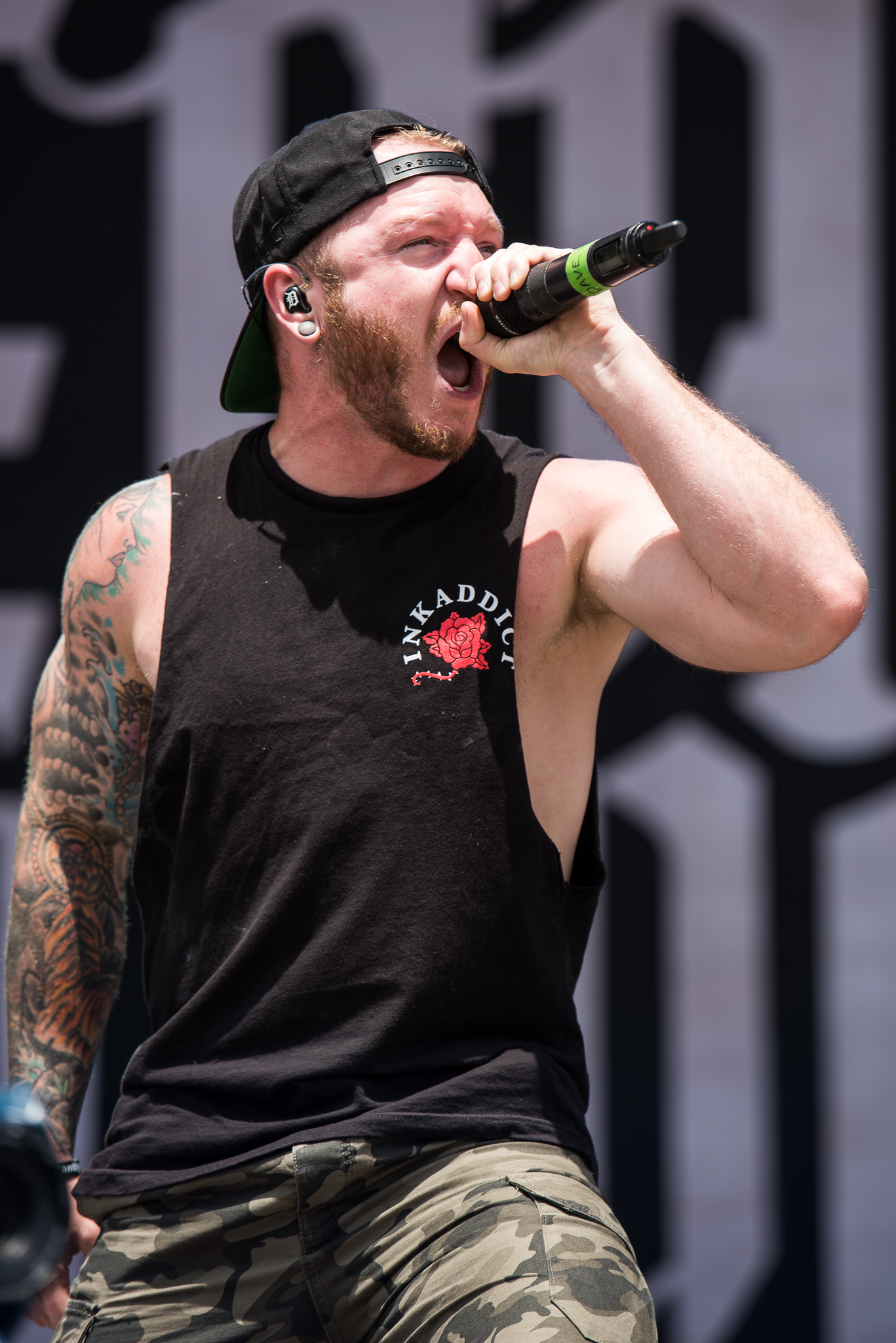 ARGO-Konzerte,David Stephens,Festival,Konzert,Livekonzert,Livemusik,Musik,RiP,Rock im Park 2016,Seat Zeppelin Stage,We Came As Romans